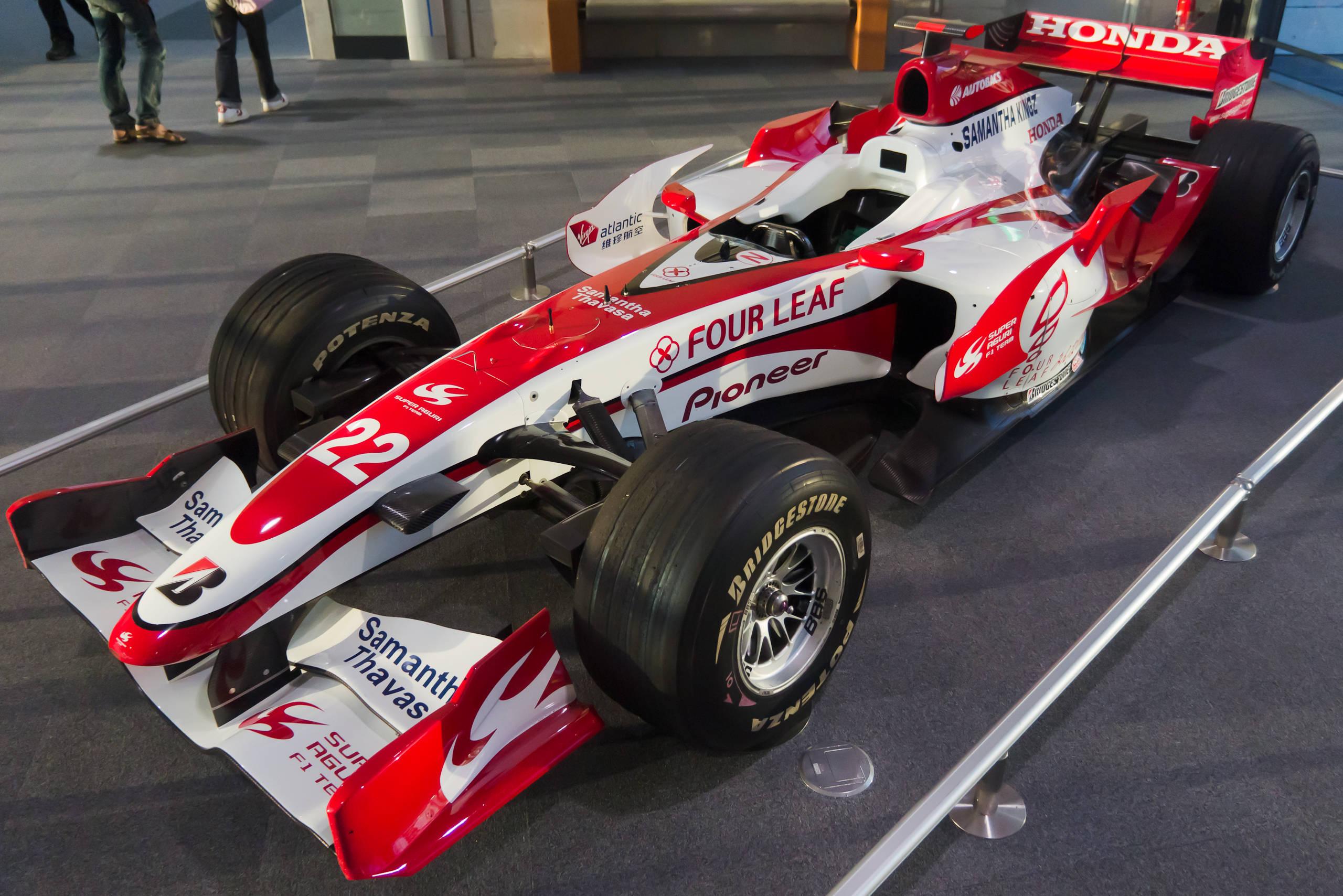 Super Aguri SA07 (#22 Takuma Sato)